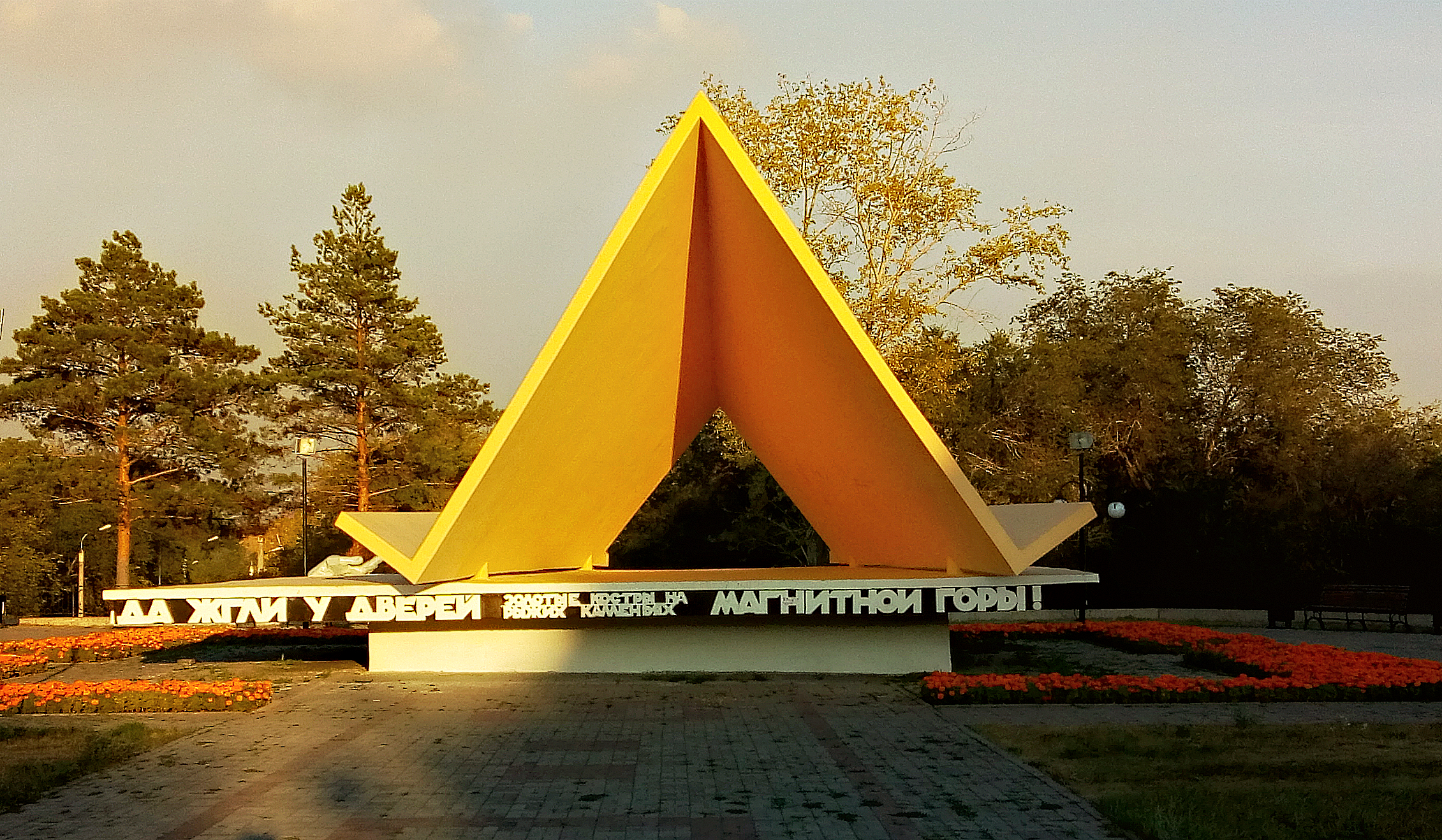 Памятник «Палатка первых строителей Магнитогорска» находится на площади Свердлова, в городе Магнитогорск, Челябинская область.